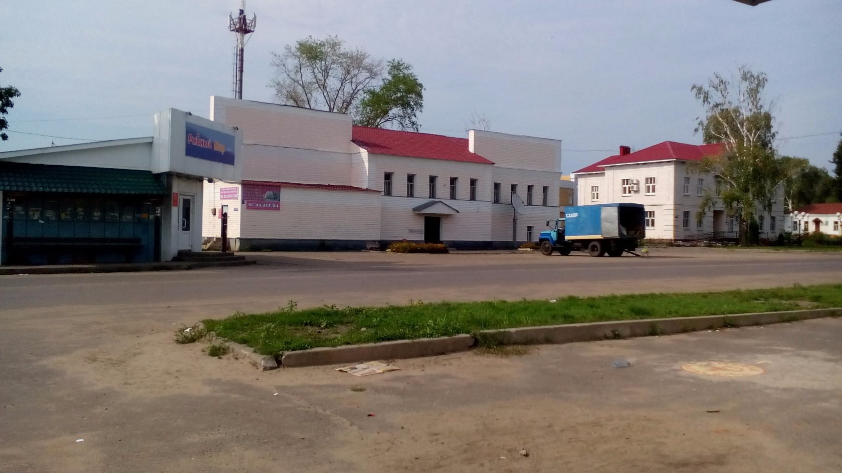 пичаево